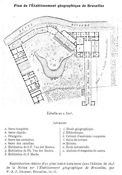 Plan de l'établissement géographique de Bruxelles (1830-1880) réalisé par Charles Sury (1814-1865) in Ciel et Terre, t. 40. Bulletin de la Société Belge d'Astronomie, Bruxelles, 1924, p.176. Image du domaine public